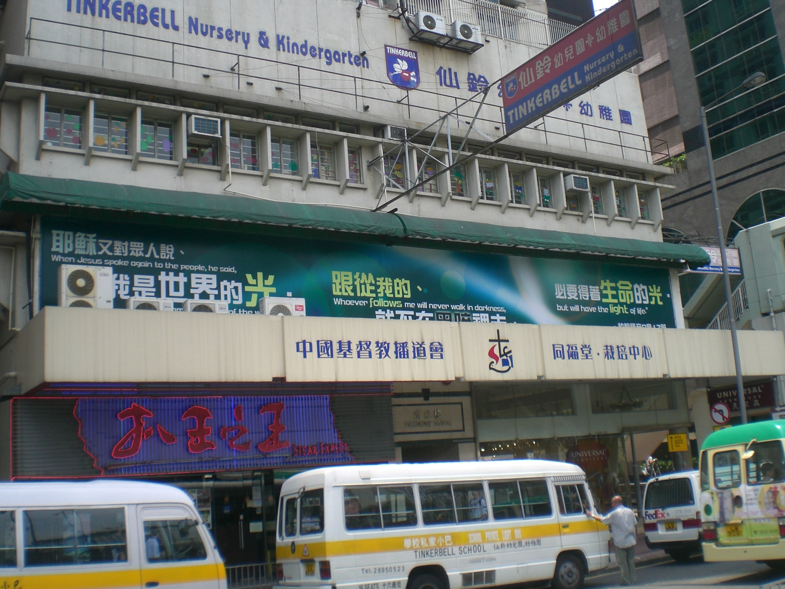 中國基督教播道會同福堂 @ 銅鑼灣高士威道